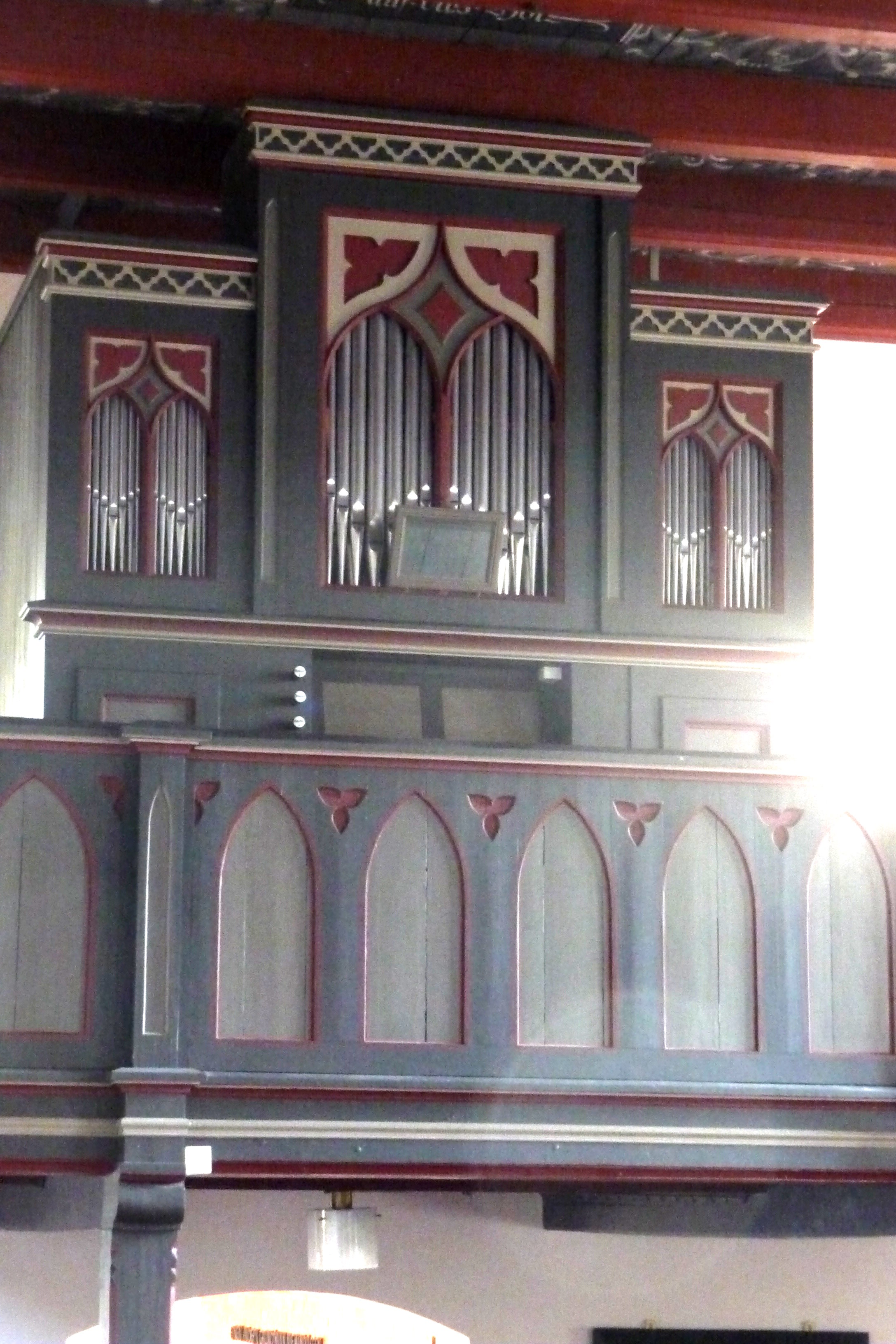 Orgel in der ev.-luth. Kirche Völlenerkönigsfehn